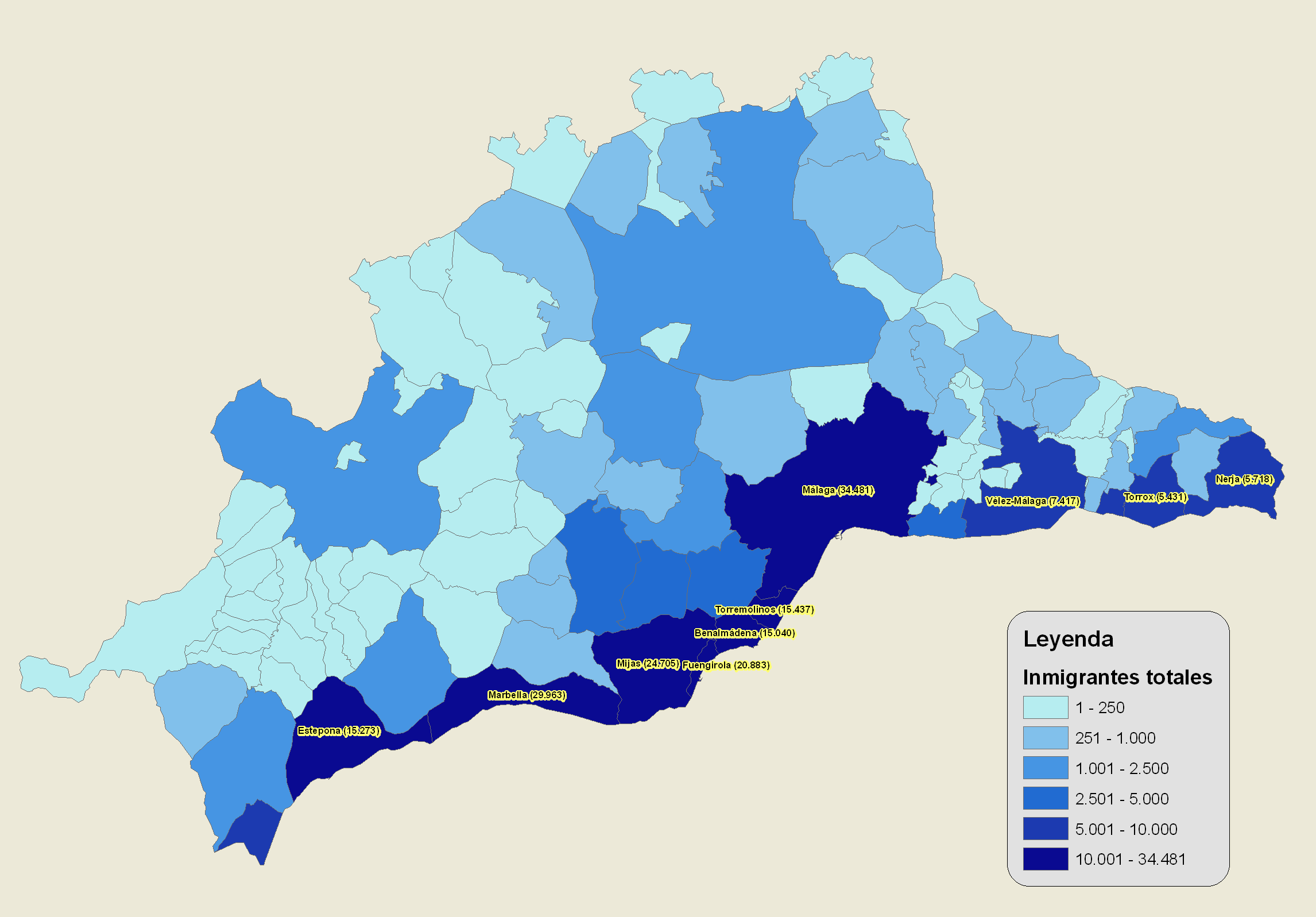 Mapa de número total de inmigrantes por municipio en la Provincia de Málaga.